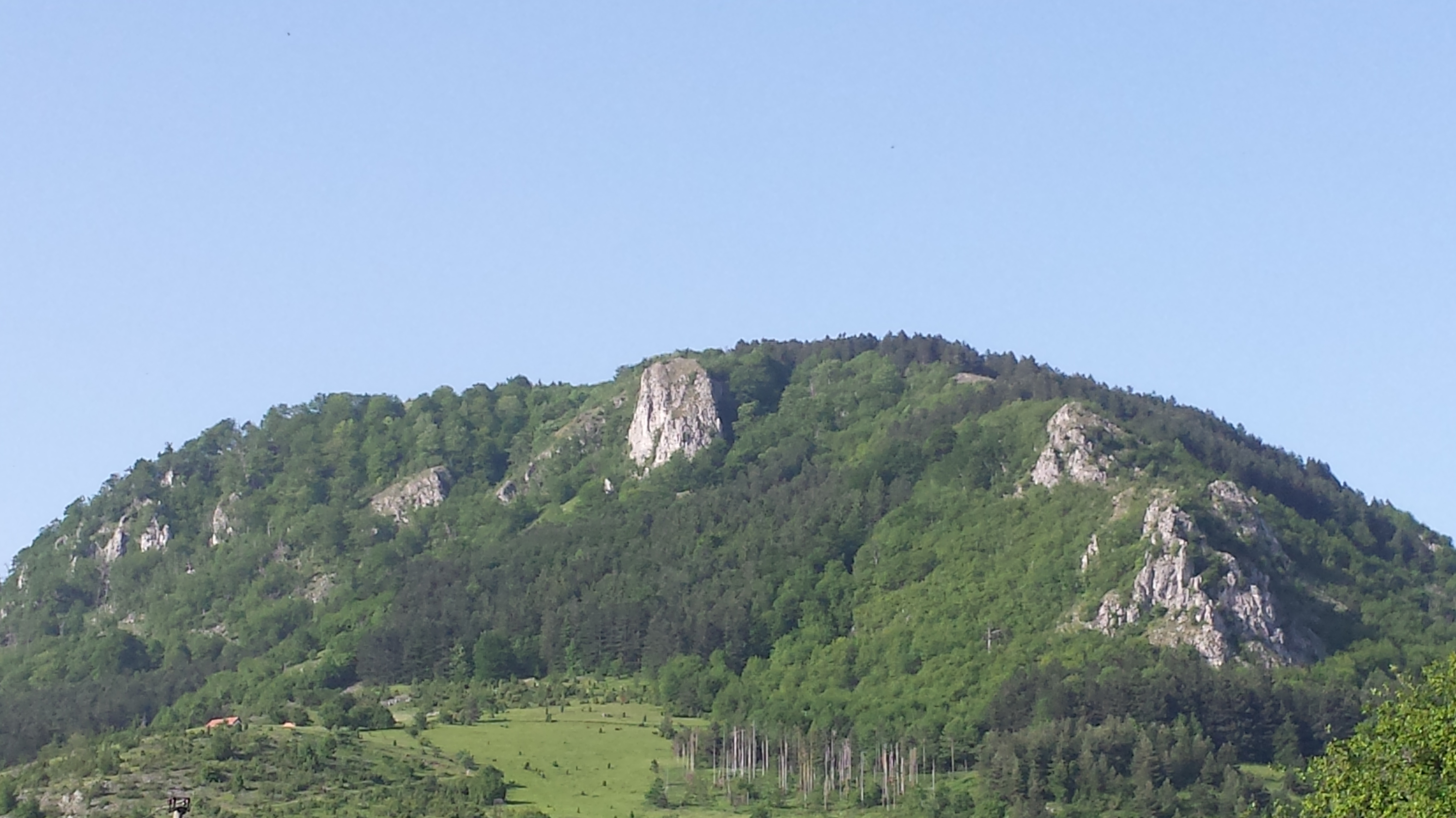 Bobija vrh